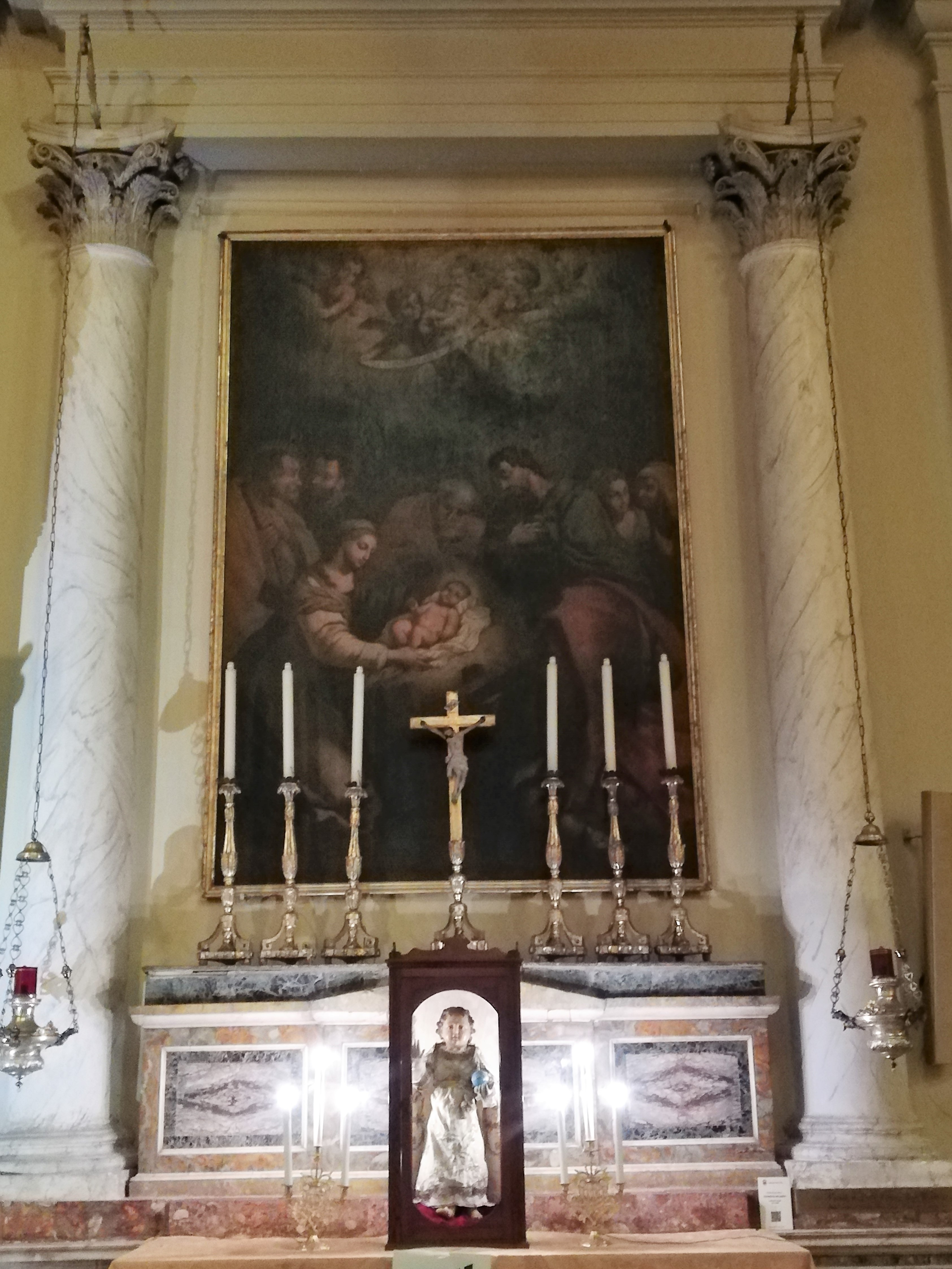 Dipinto.